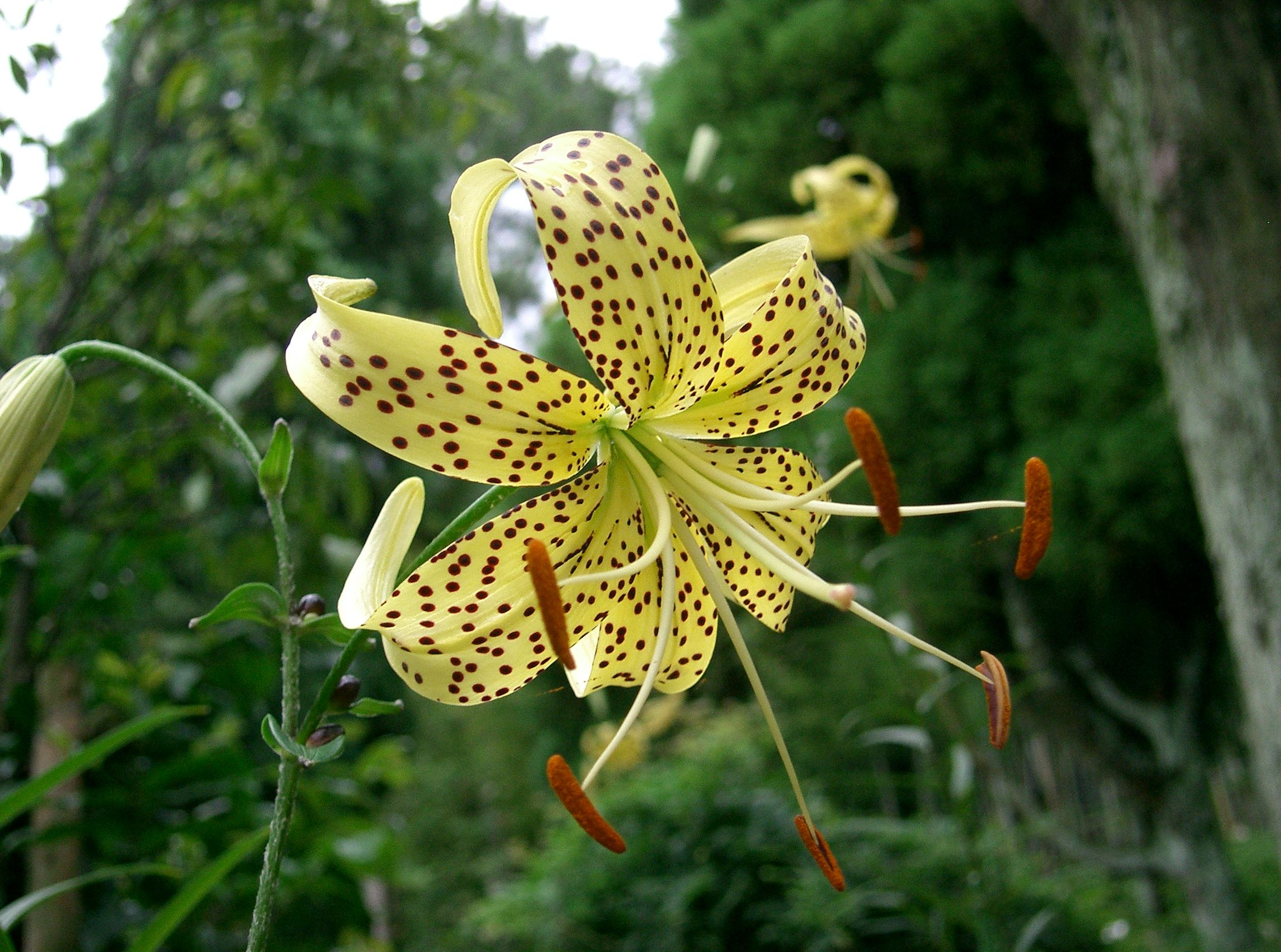 Lilium lancifolium var. flaviflorum